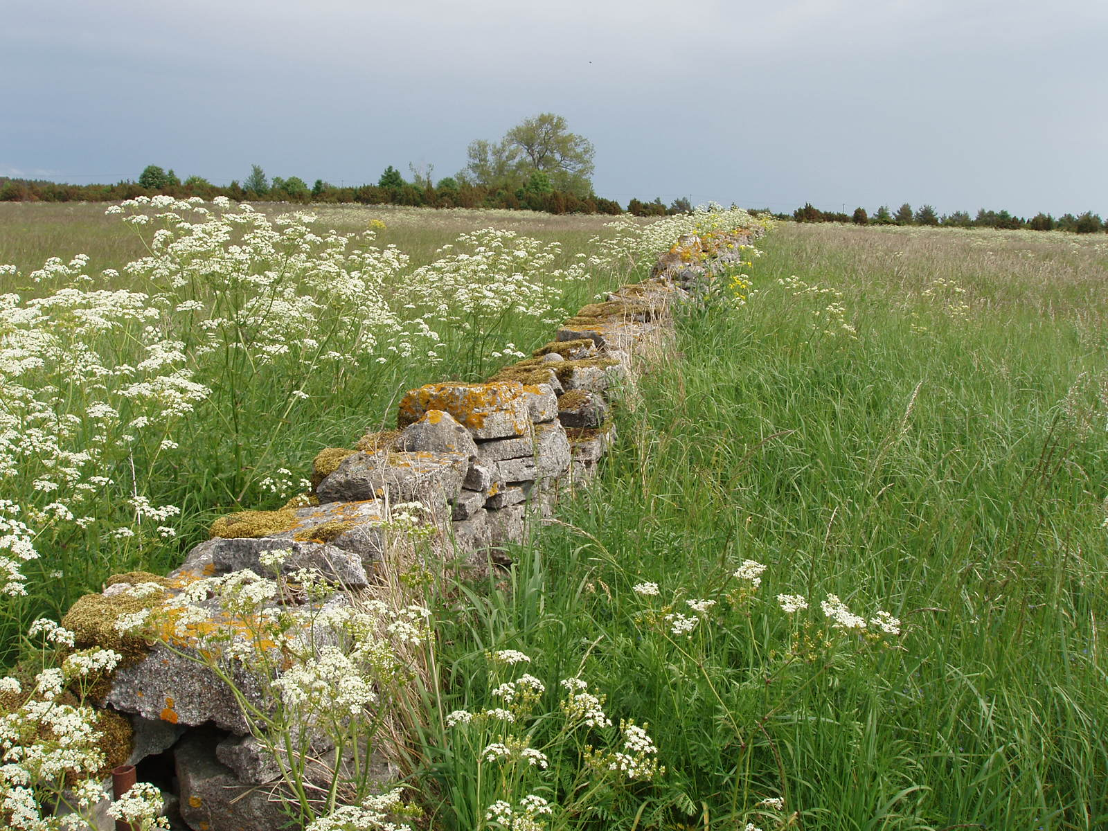 Kiviaed Vilsandil